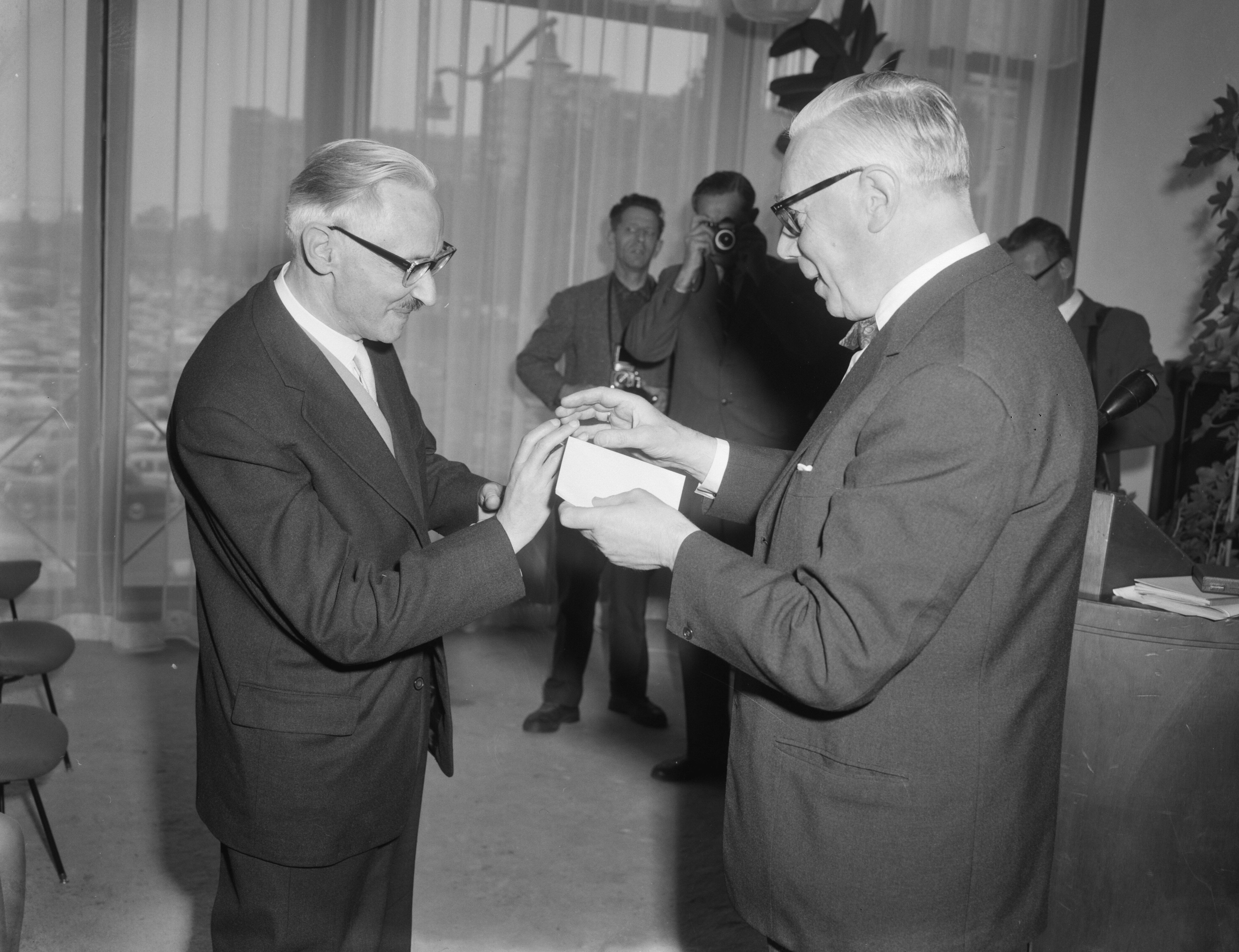 Collectie / Archief : Fotocollectie Anefo Reportage / Serie : [ onbekend ] Beschrijving : Uitreiking Pierre Bayle Prijs aan W. Jos de Gruyter Datum : 27 april 1961 Trefwoorden : Uitreikingen Persoonsnaam : W. Jos de Gruyter Fotograaf : Behrens, Herbert / Anefo Auteursrechthebbende : Nationaal Archief Materiaalsoort : Negatief (zwart/wit) Nummer archiefinventaris : bekijk toegang 2.24.01.04 Bestanddeelnummer : 912-4307